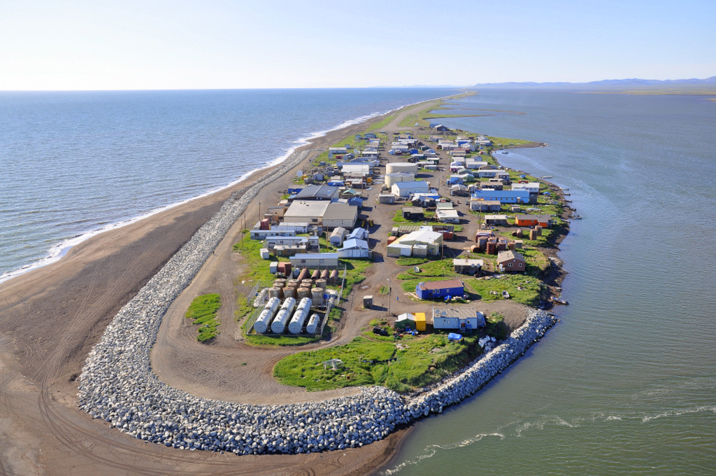 Kivalina vista dall'alto